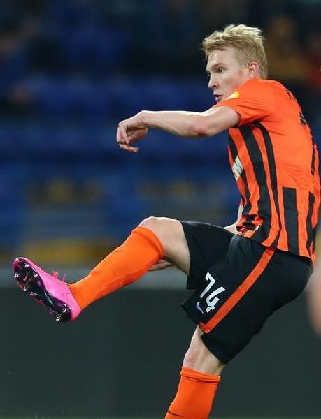 Віктор Коваленко під час виступів за Шахтар